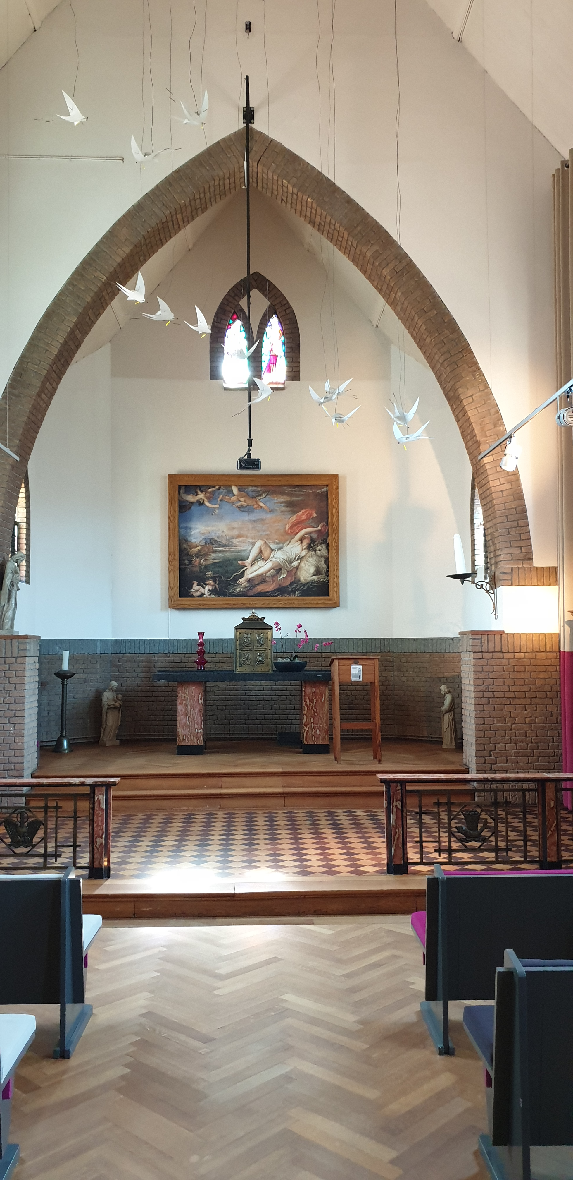 De Hyacinthuskapel, interieur, Dominicushof 18a, Tiel, Nederland